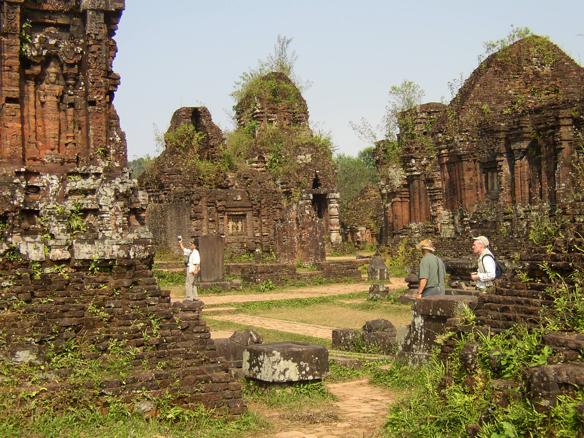 Ruinen auf dem Gelaende von My Son